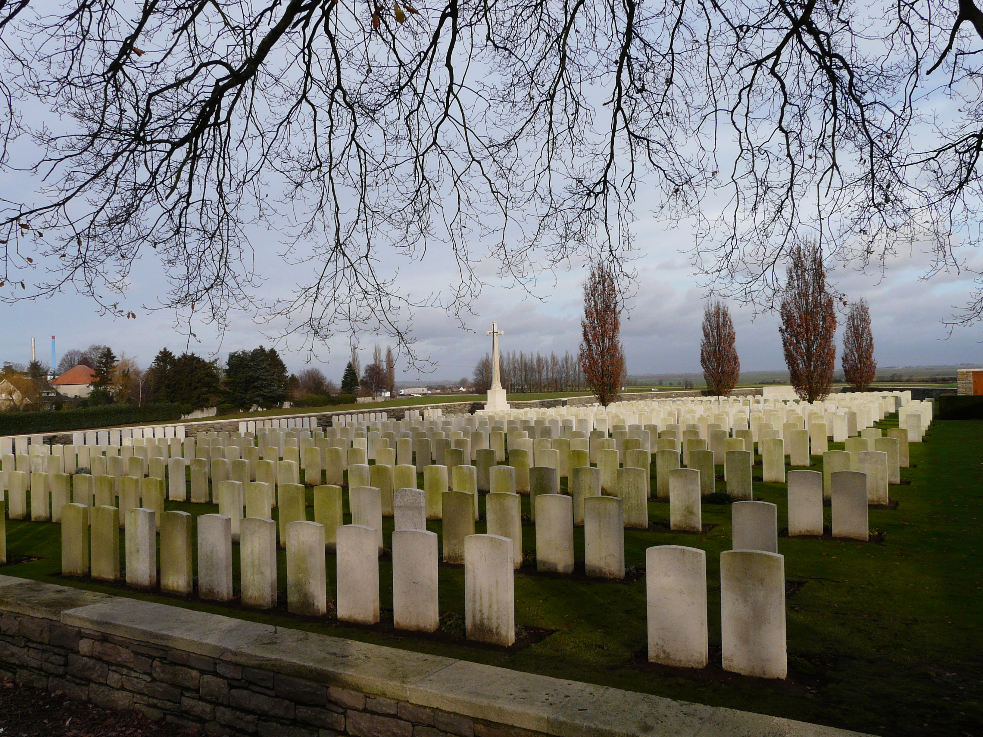 CWGC cemetery in Awoingt (Nord)